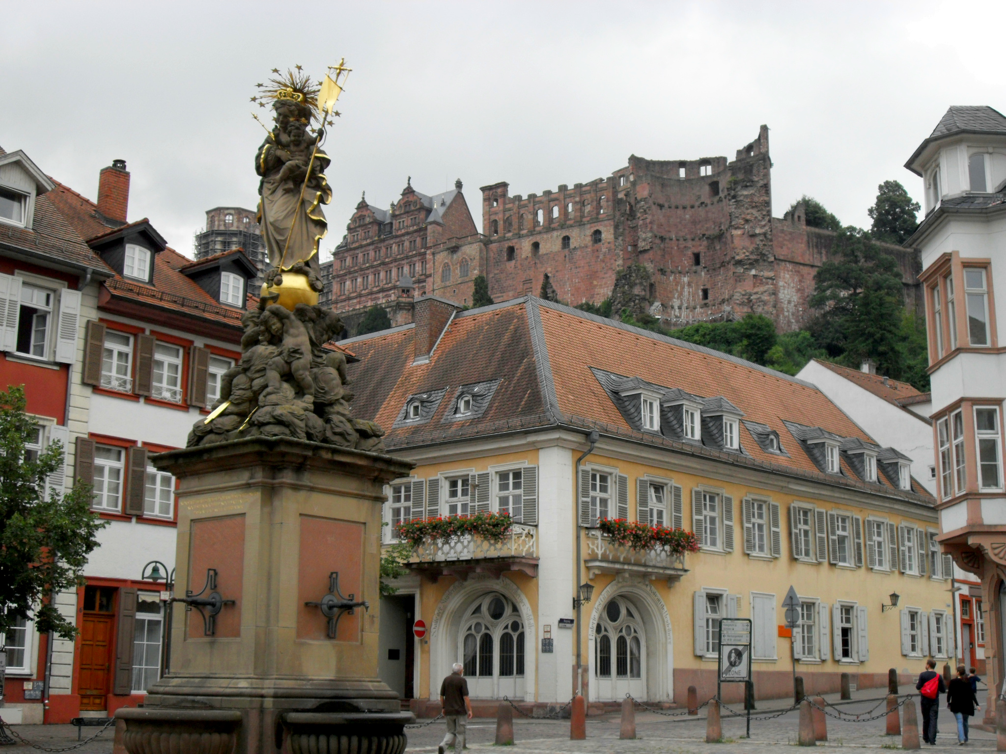 Хлебный (Зерновой) рынок возник в XVI веке